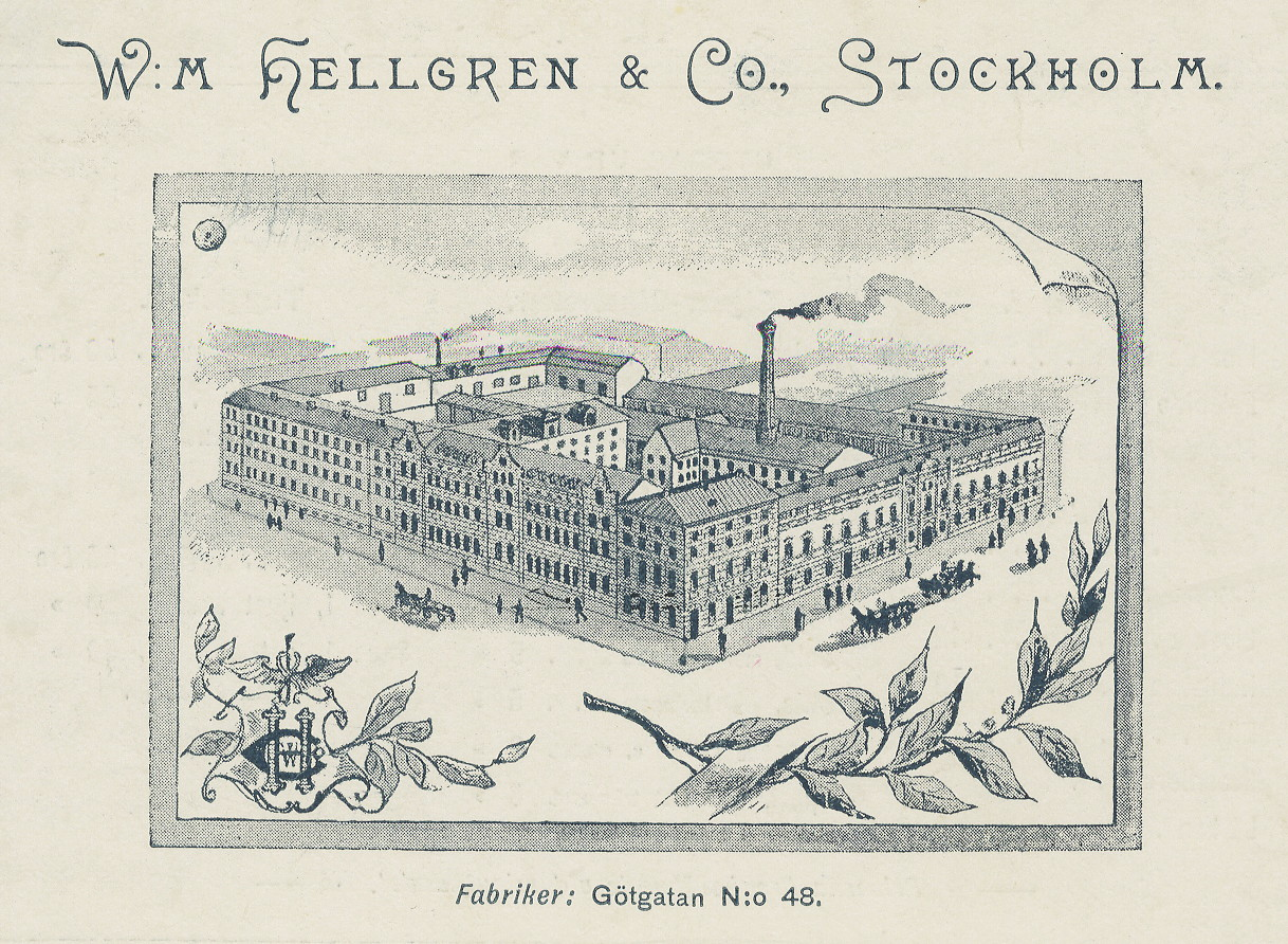 Vy över W:m Hellgrens fabriks och bostadskomplex vid Götgatan och Åsögatan 1897